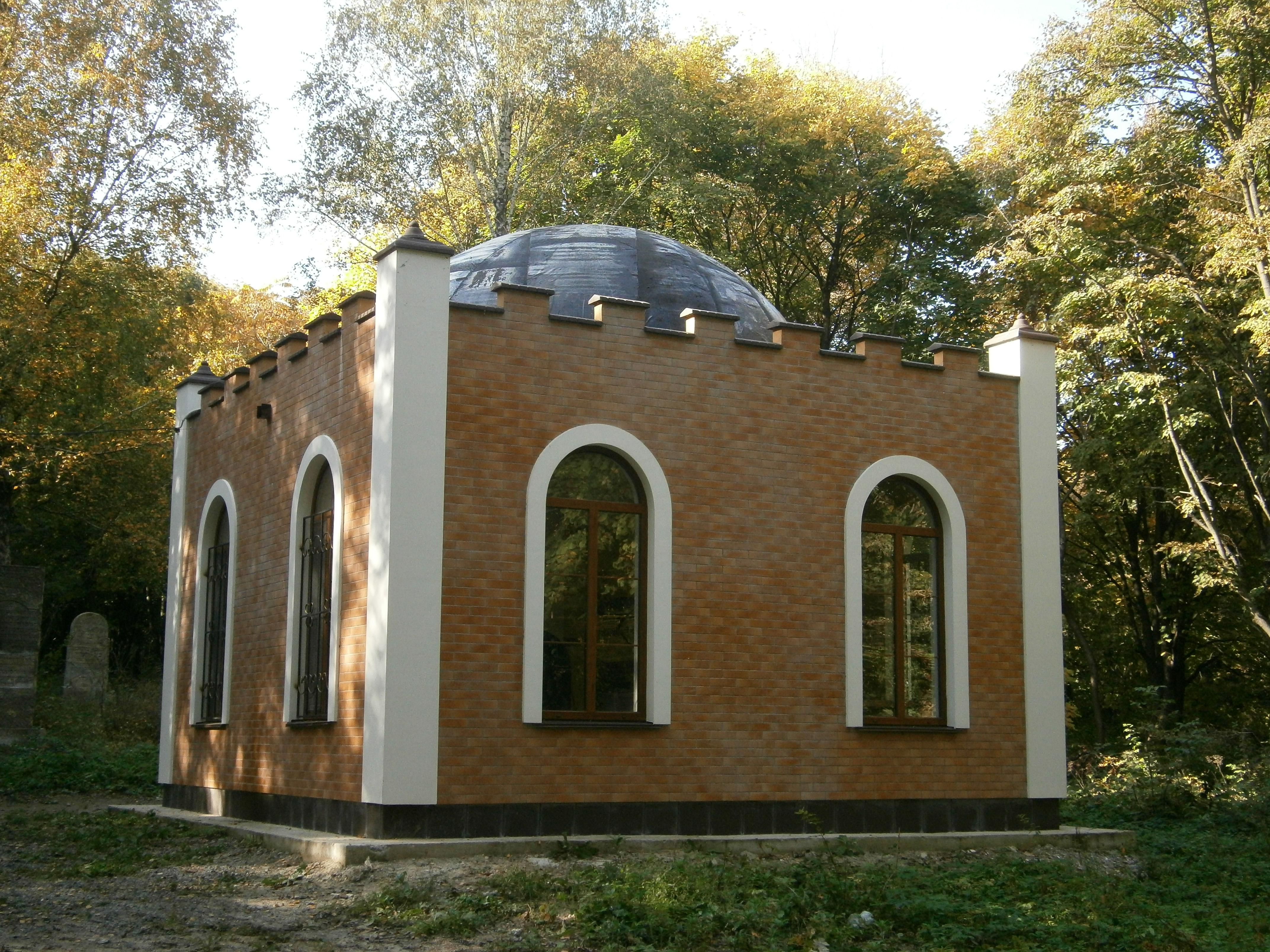 Могила Самуіла Едельса, Острог, колишнє єврейське кладовище